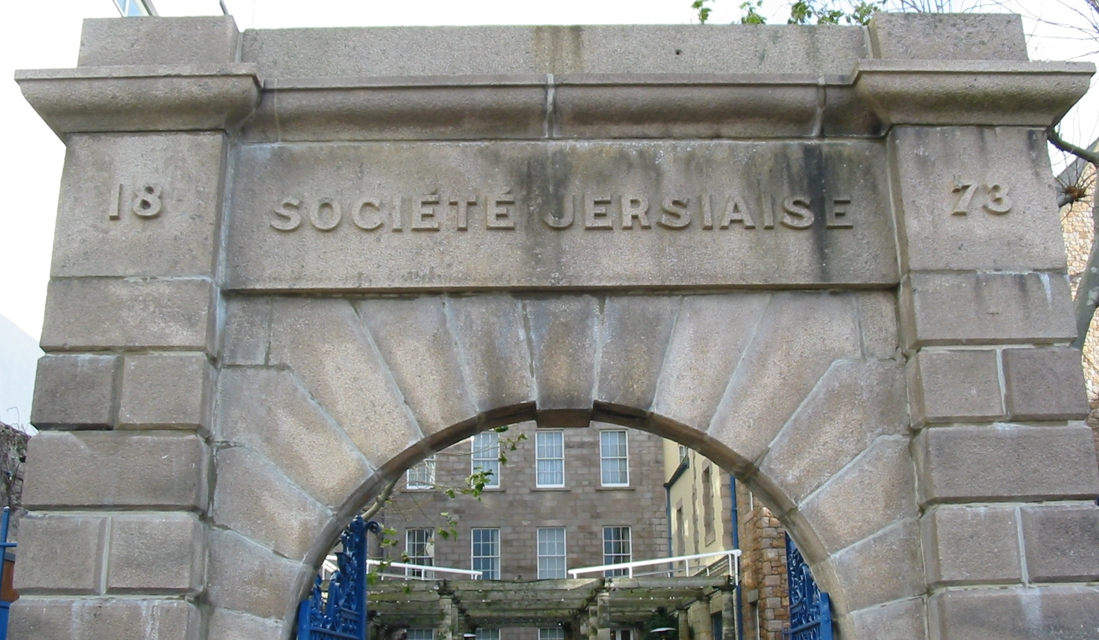 Nrf: Jèrri